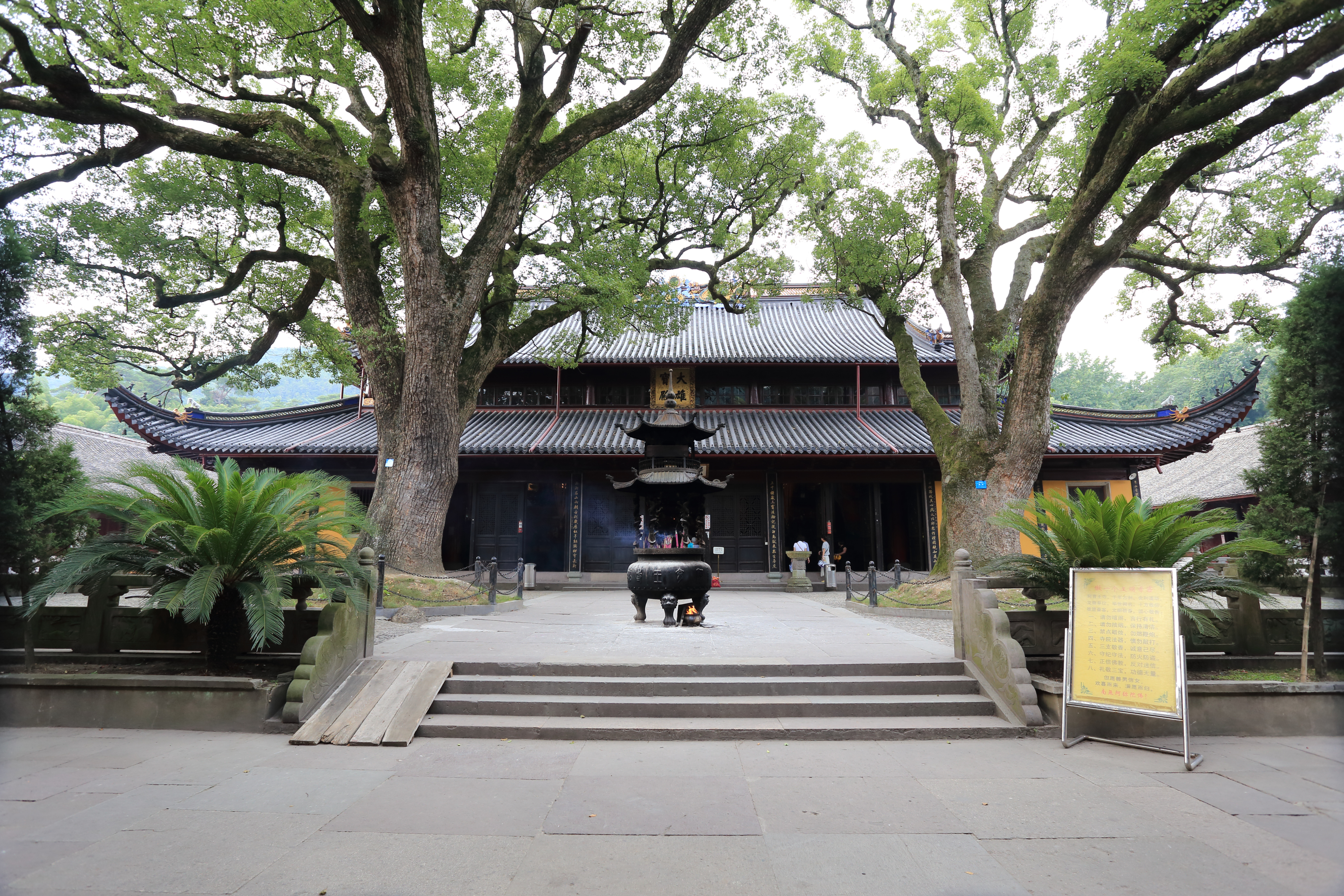 宁波阿育王寺 —— 大雄宝殿